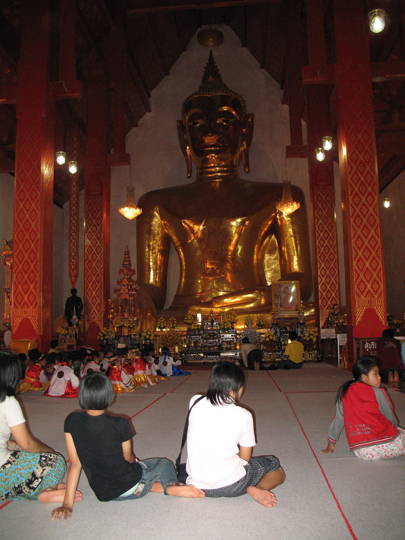 Phra Chao Ton Luang, Wat Si Khom Kham, Phayao Province.